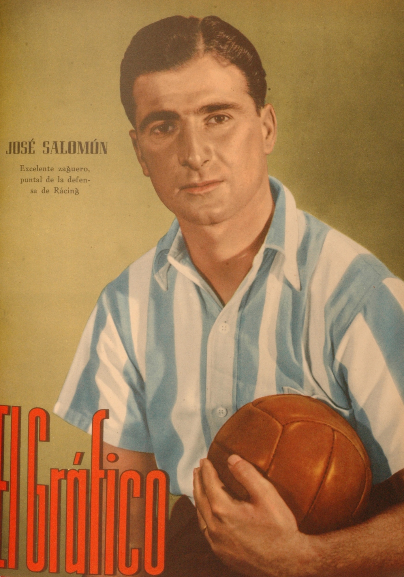 El Grafico del 28 de Junio de 1940. Edicion 1094